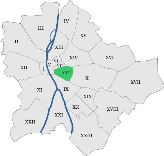 map hungary budapest district 8